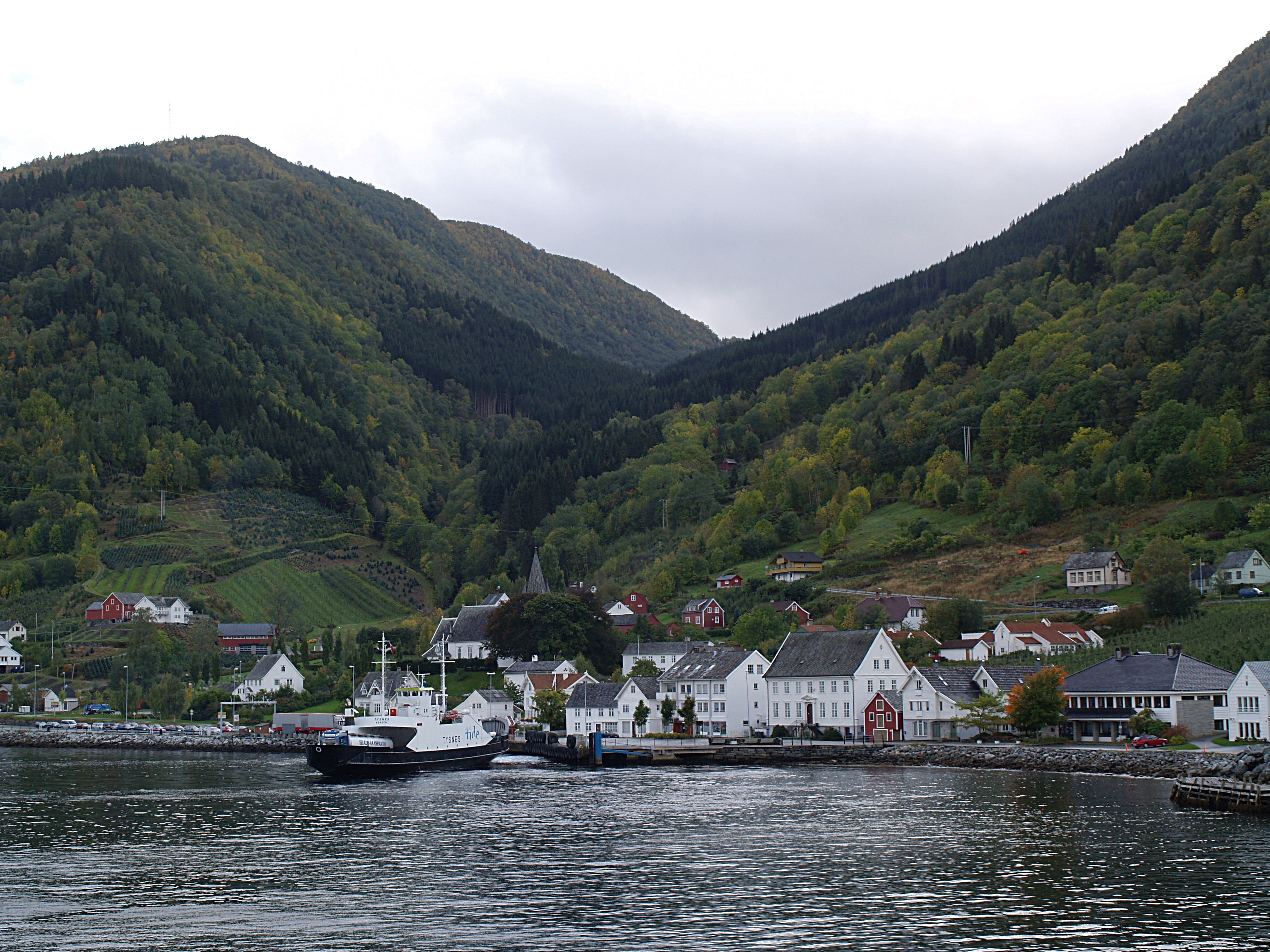 Ferry at Utne in Hardanger